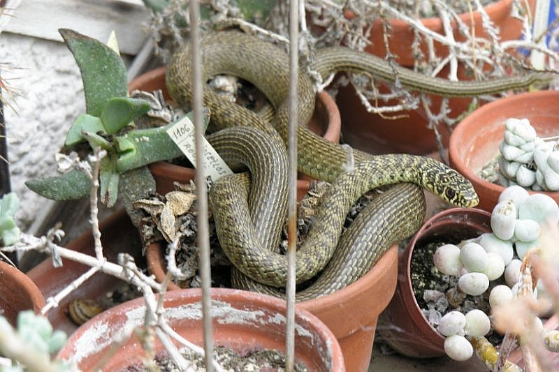 Hierophis_viridiflavus, Gradignan, Gironde, France